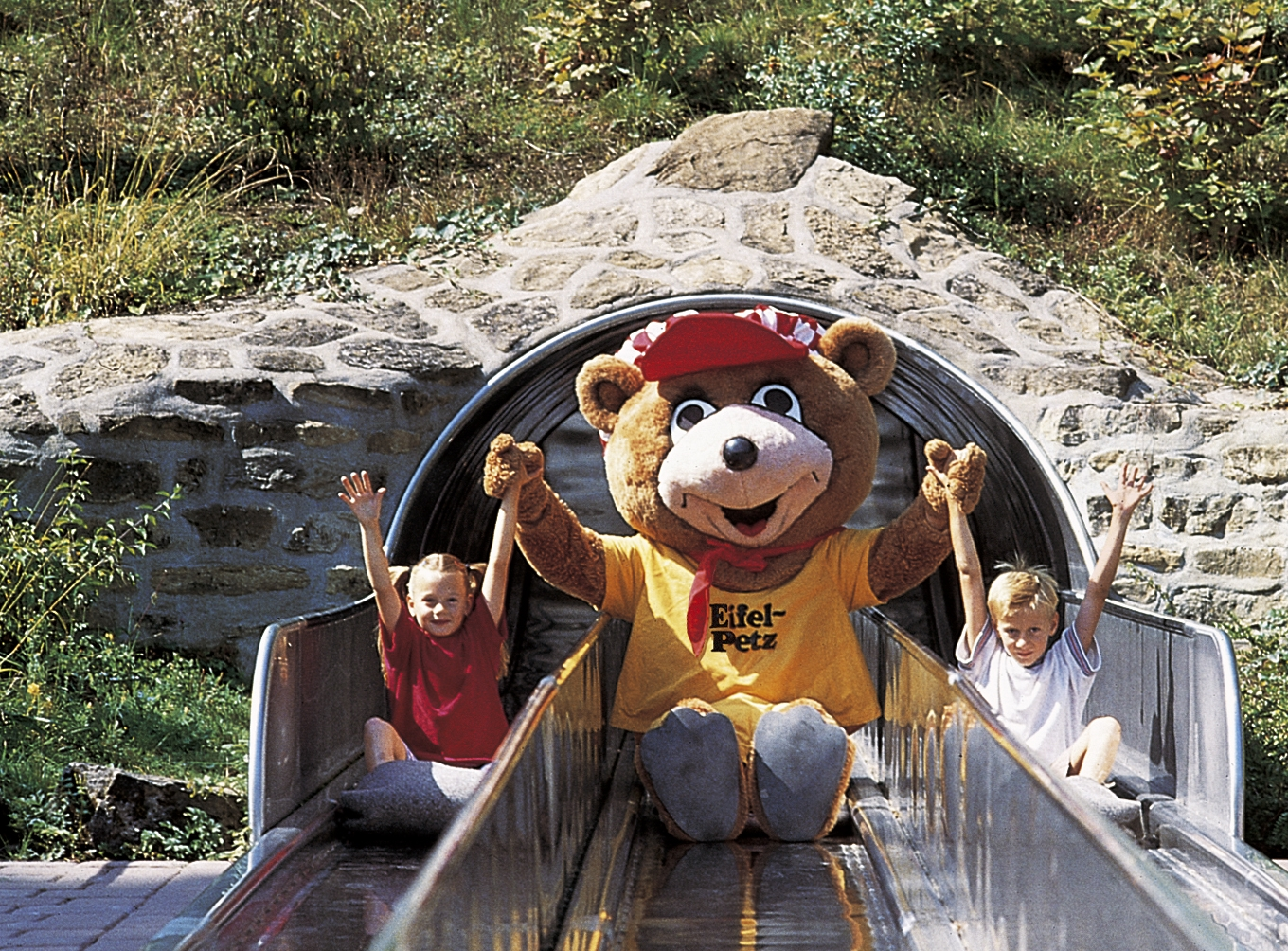 ifelpetz (Maskottchen Eifelpark) mit Besuchern auf der Freifallrutsche.